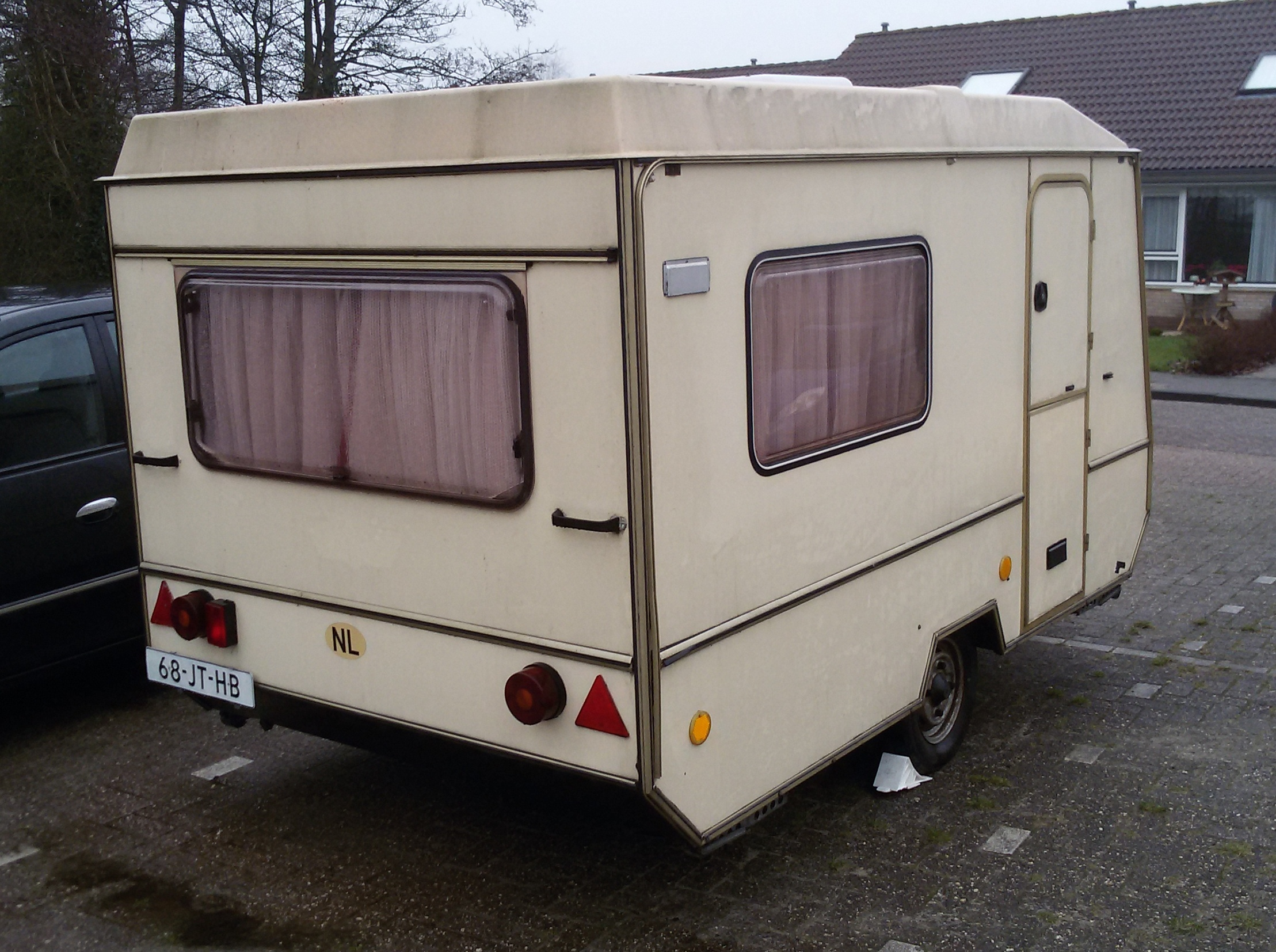 Bastei 351, achteraanzicht - VEB IFA Karosseriewerke Dresden, DDR